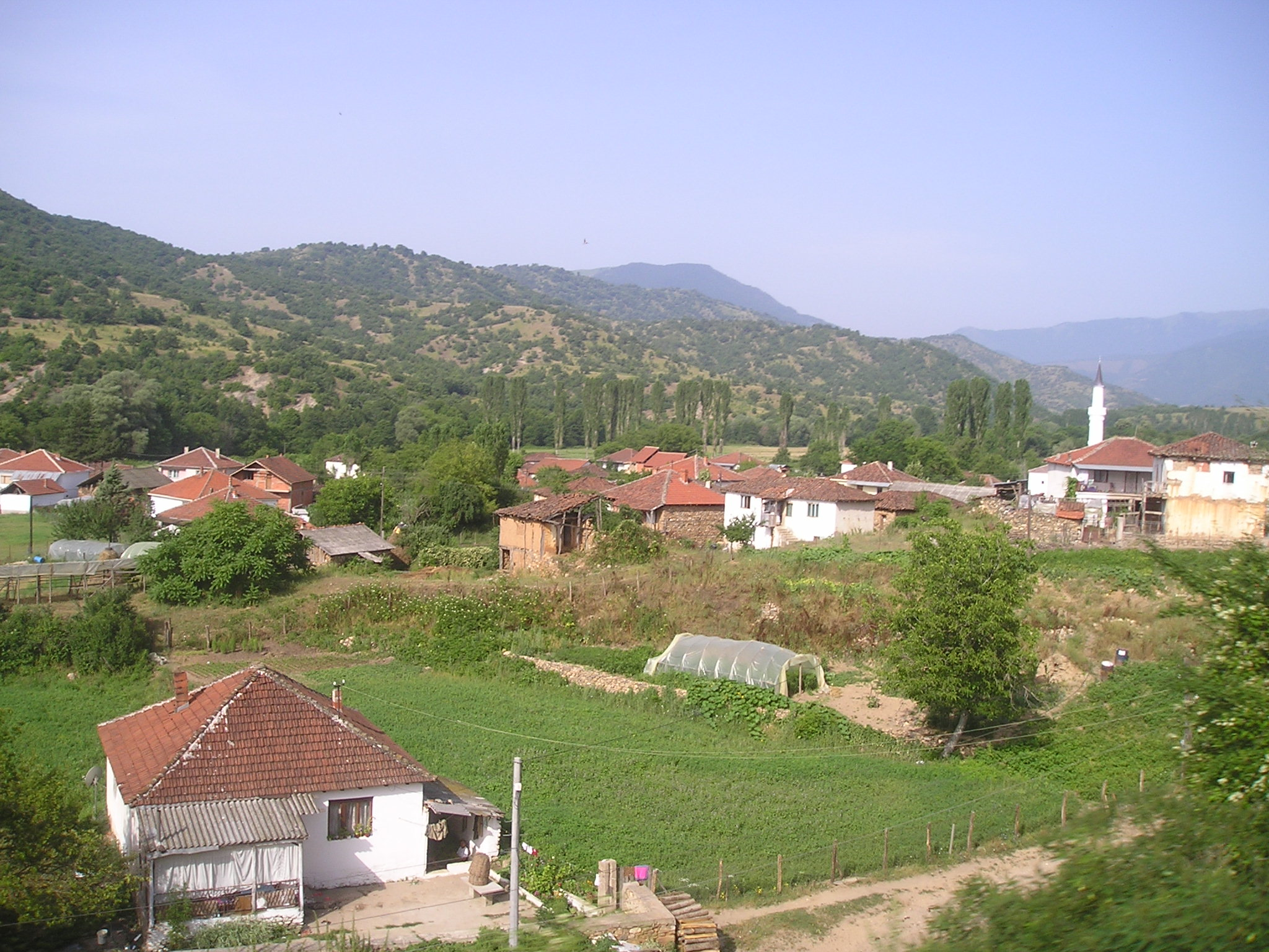 Sogle village in Čaška commune near Veles, R.o.Macedonia Wieś Sogle w gminie Čaška koło Velesu, Macedonia Согле - село во Општина Чашка, во околината на градот Велес, Македонија